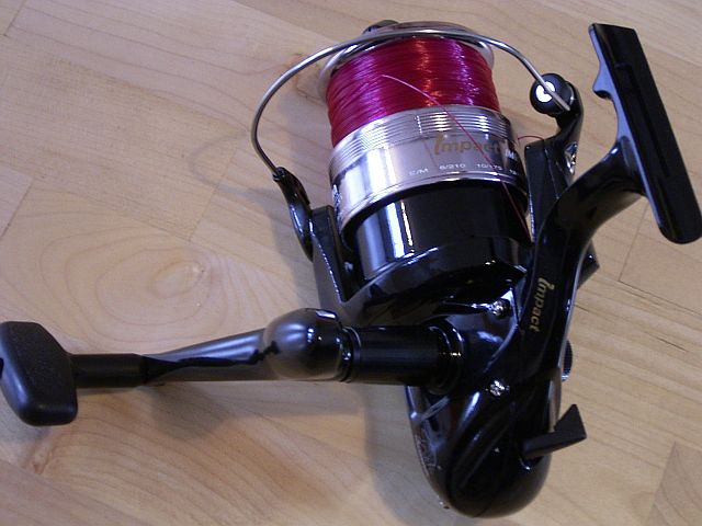 Stationärrolle